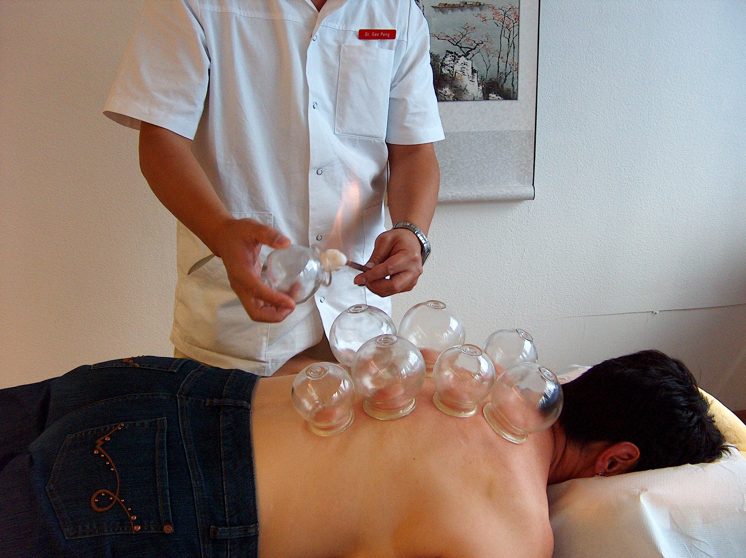 Schropfen Akupunktur-Klinik: Yin Yang Medi AG in Burgdorf